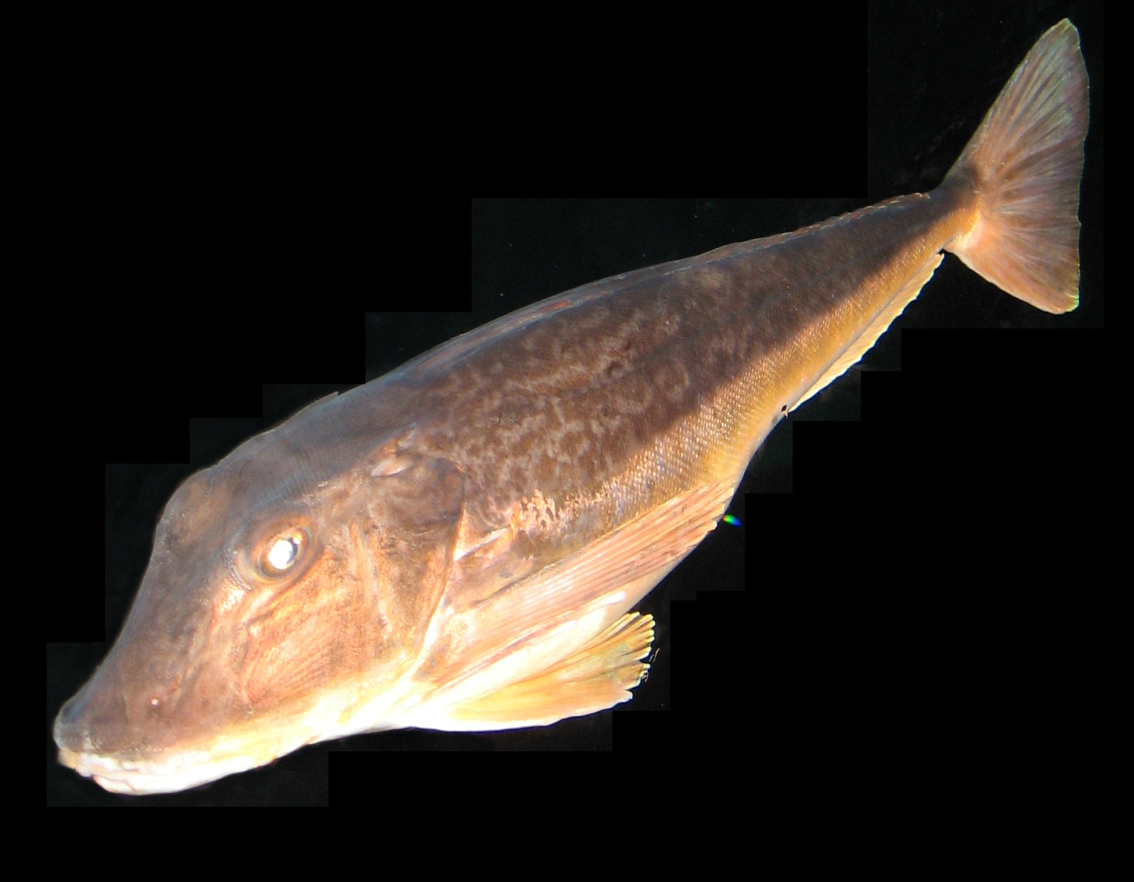 Chelidonichthys lucernus (Syn Trigla lucerna) in Aquarium Cinéaqua Map: 48° 51' 44" N 2° 17' 27" E